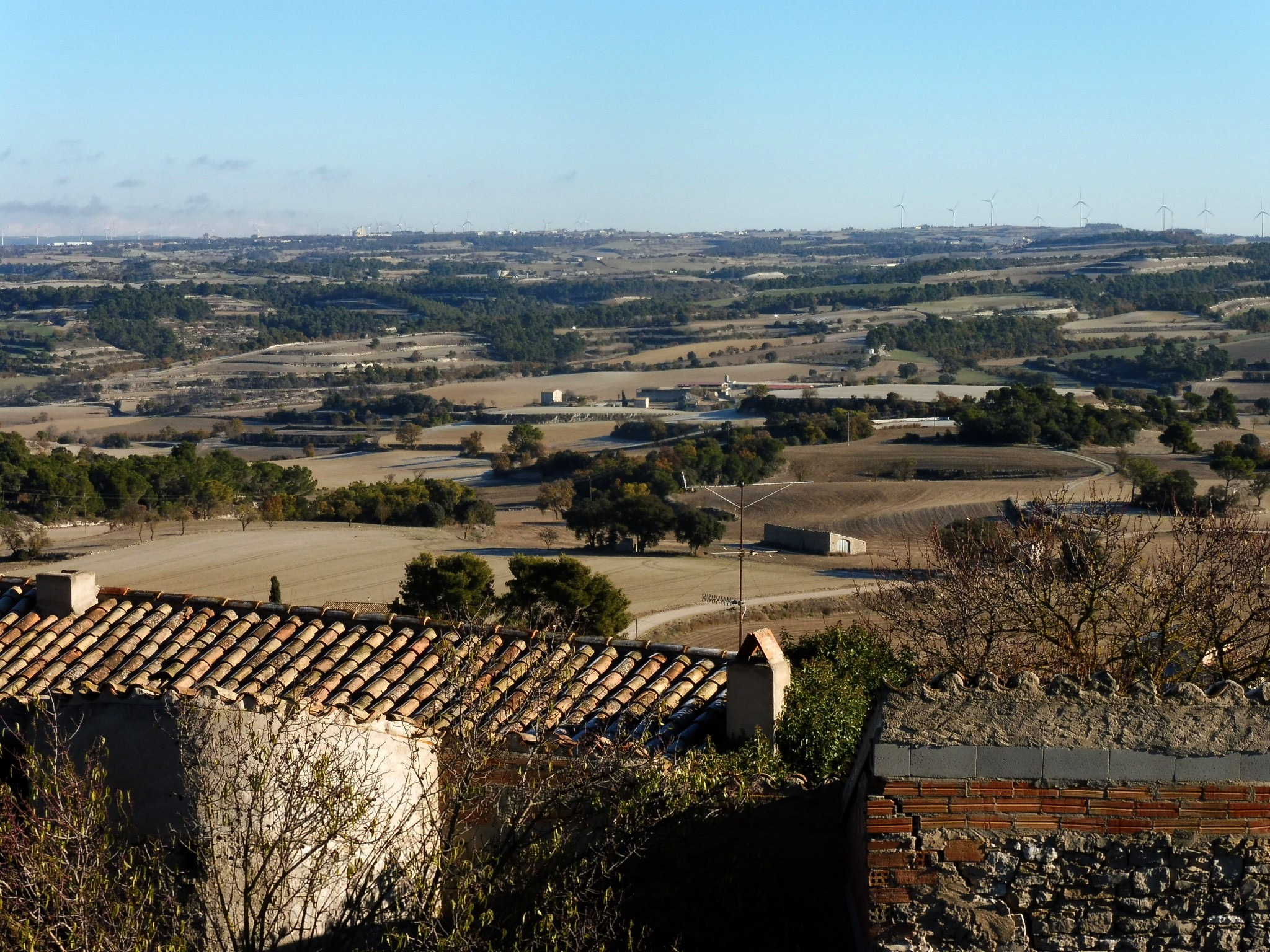 Castell de Pavia (Talavera): vista des del castell